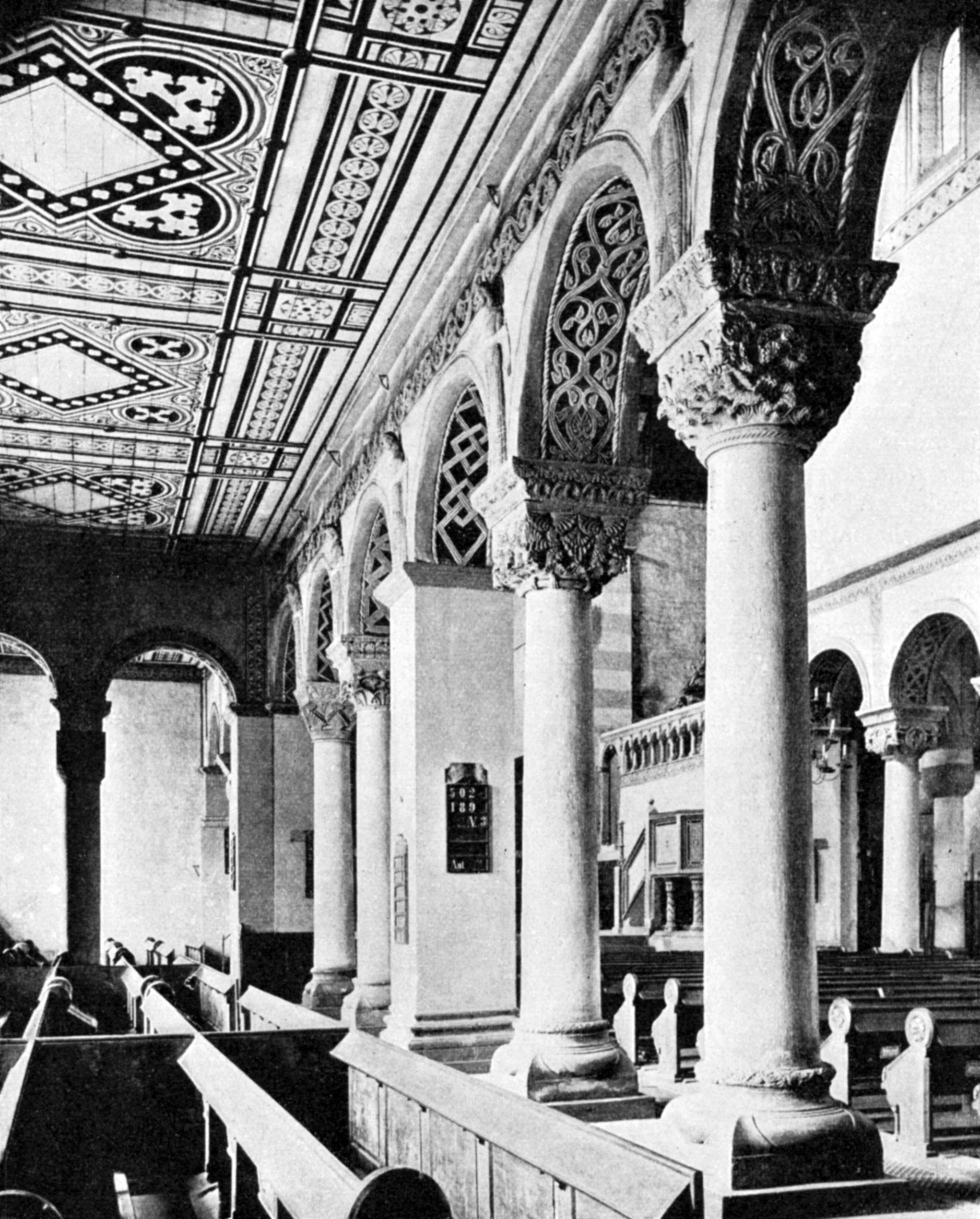 St. Michael (Hildesheim) - Germany, erbaut 1010-1033, südliches Seitenschiff mit Blick in das Mittelschiff und auf die Kanzel vor der Engelchorschranke in der gewesteten Kirche vor 1945